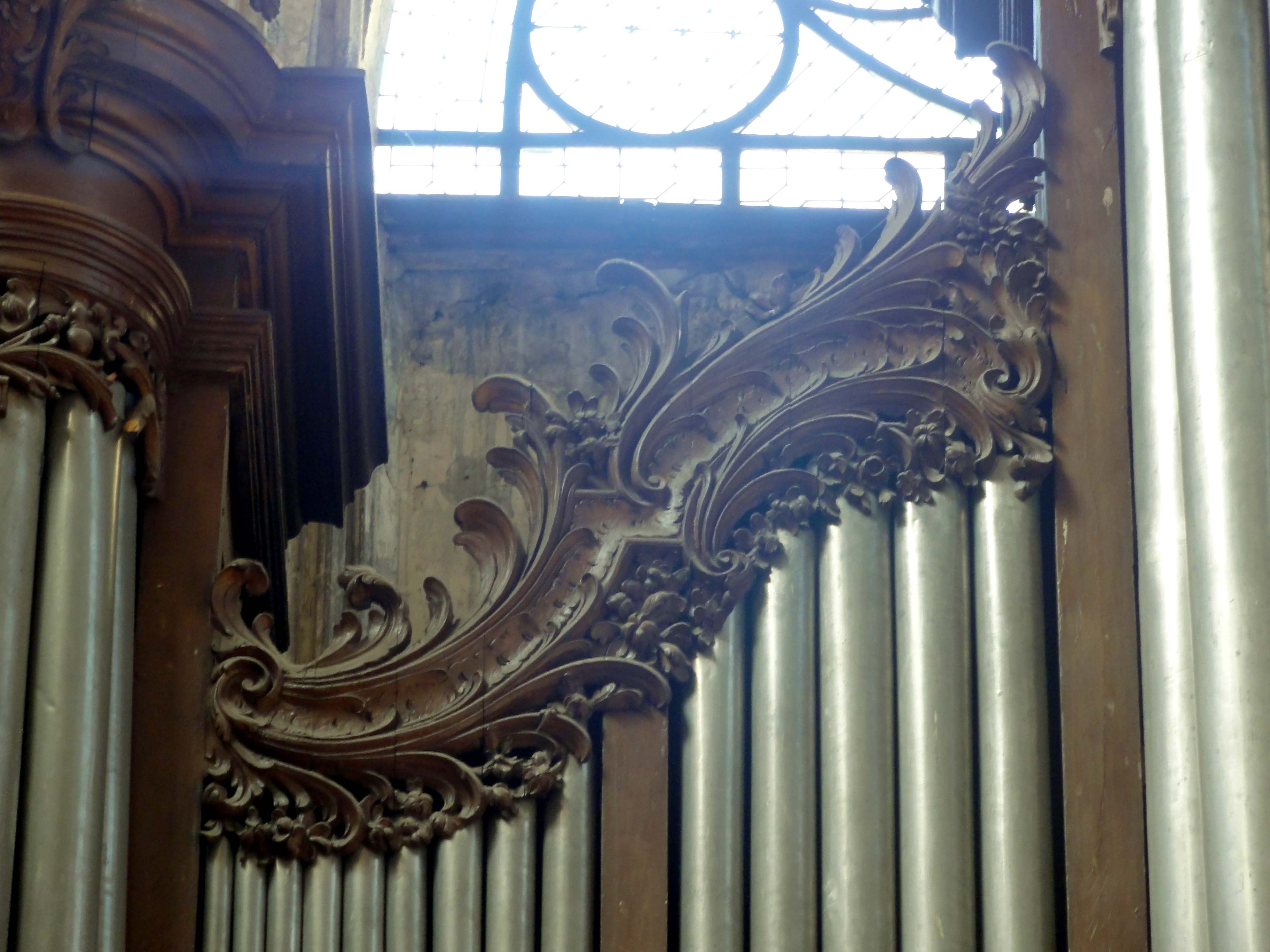 Orgue de tribune.